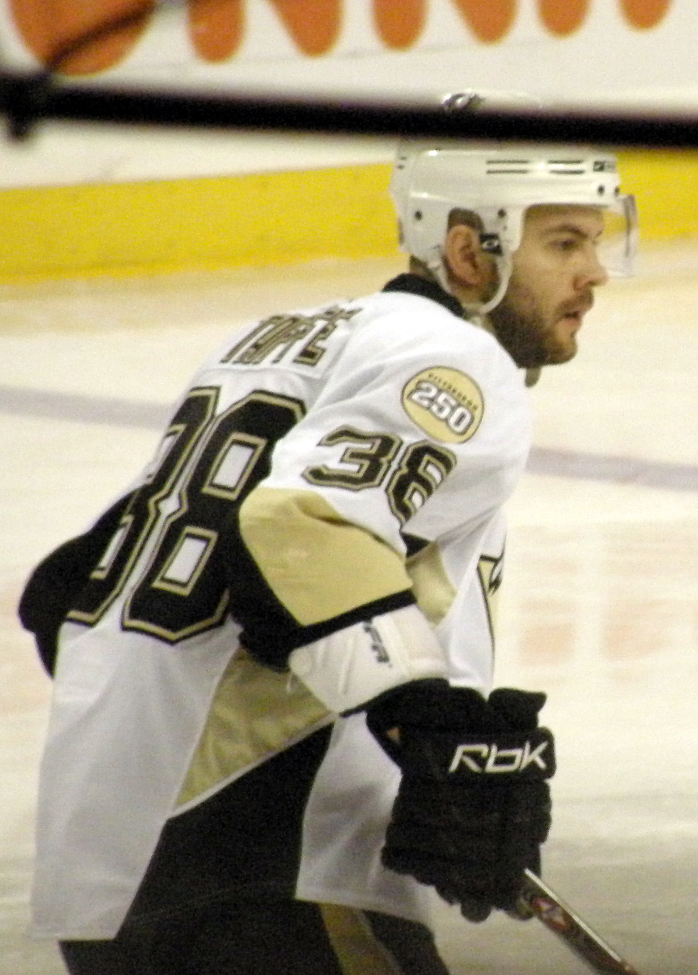 #38 Jeff Taffe (LW)